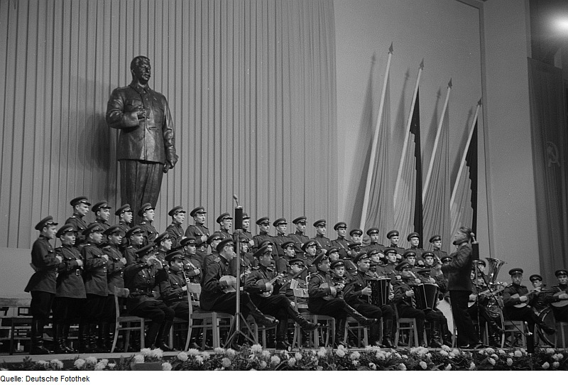 Original image description from the Deutsche Fotothek Blick auf die Bühne mit dem Ensemble der sowjetischen Streitkräfte